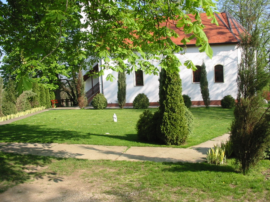 Gutorfölde, templomkert